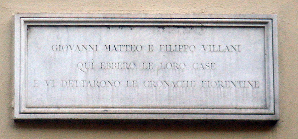 Giovanni Matteo e Filippo Villani Qui ebbero le loro case E vi dettarono le cronache florentine Targa Fratelli Villani, in Florence